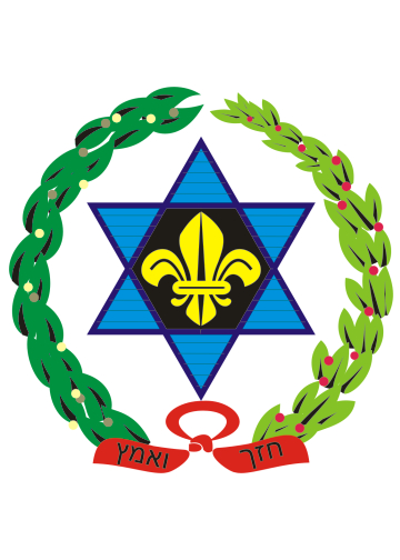 El Simbolo de Hashomer Hatzair. La inscripcion "Jazak Ve´ematz", en hebreo, significa "Fuerte y Valiente".